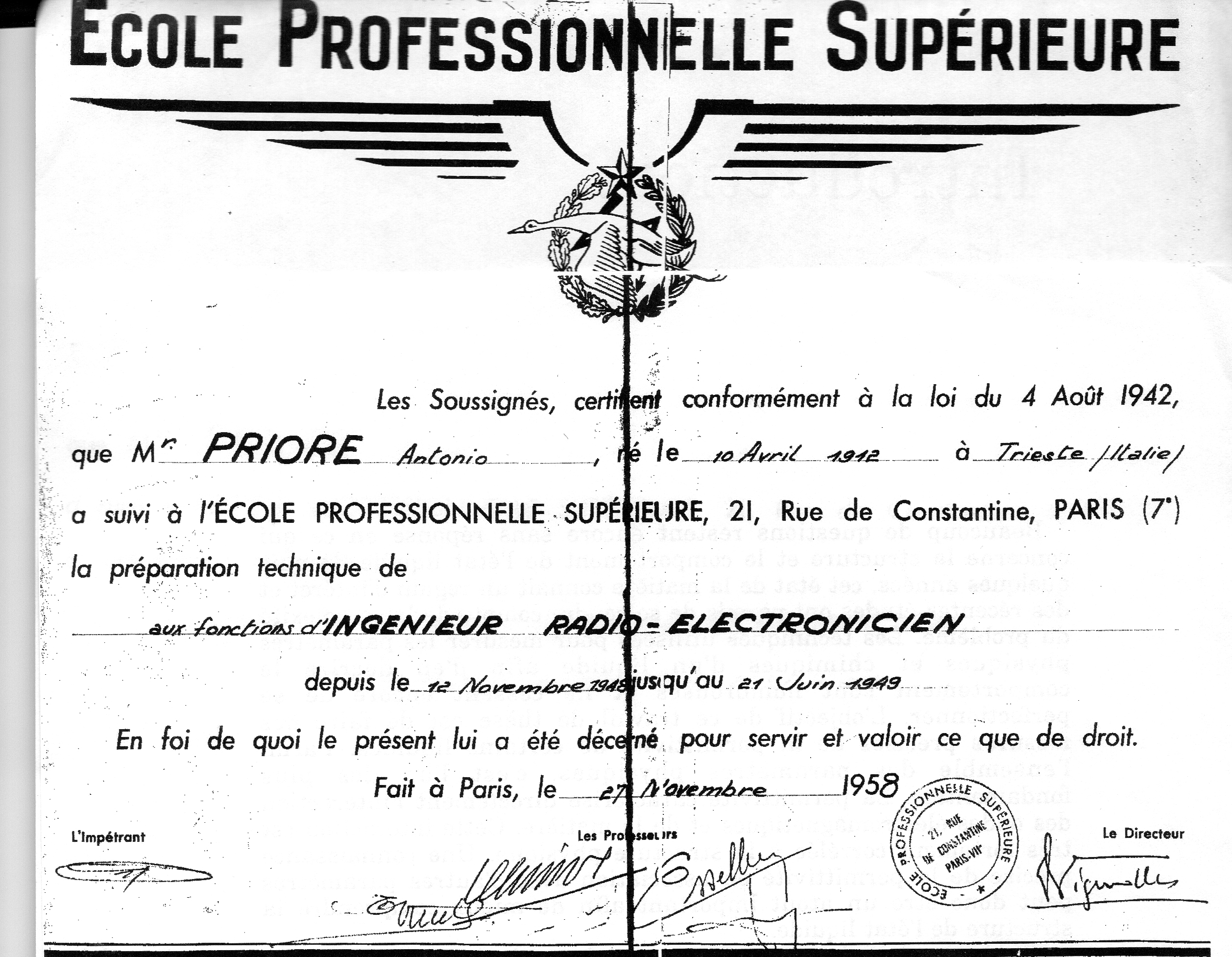 Attestation de formation professionnelle 1948-1949